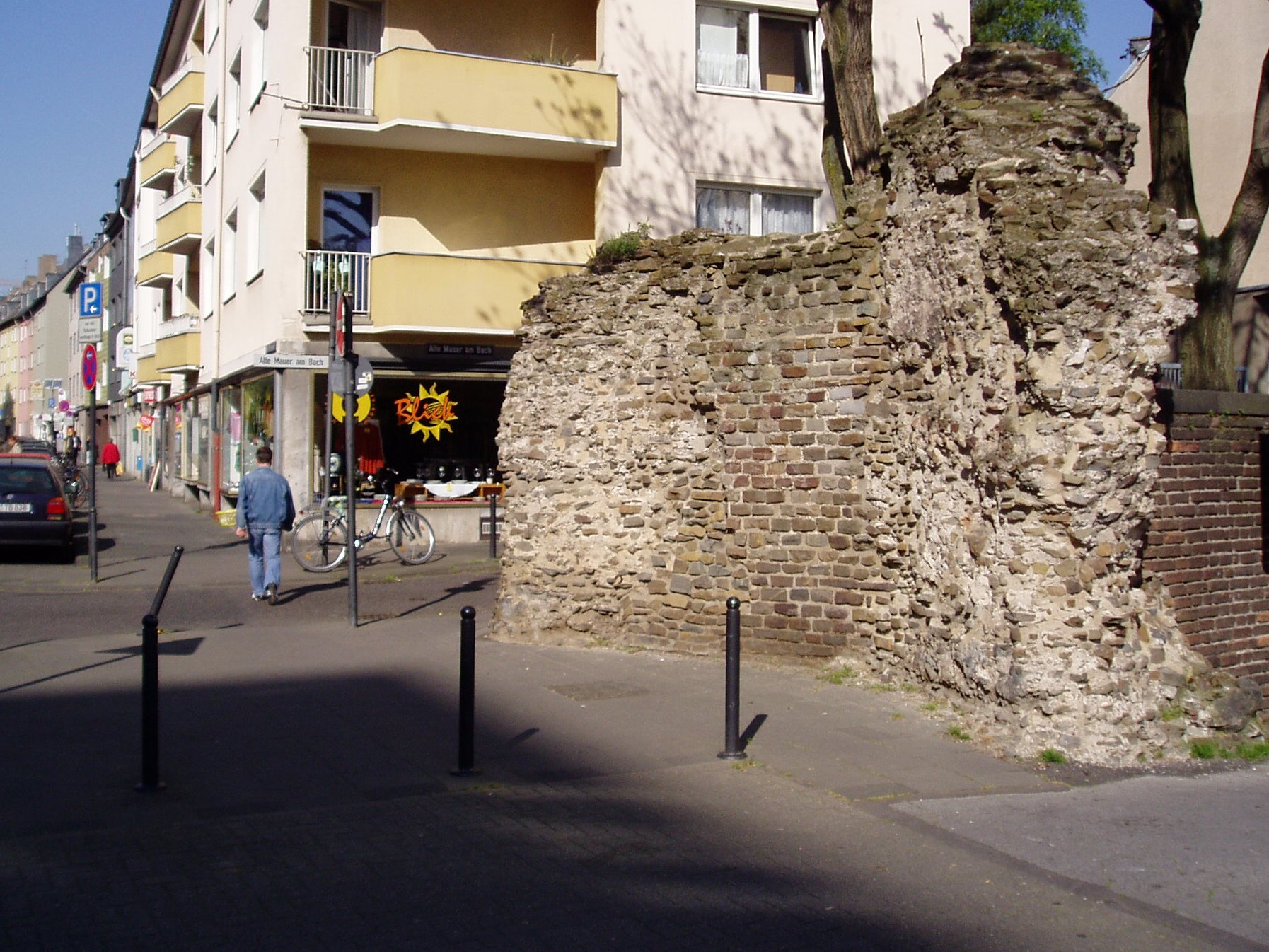 Köln-Altstadt Süd - Alte Römermauer am Kleinen Griechenmarkt